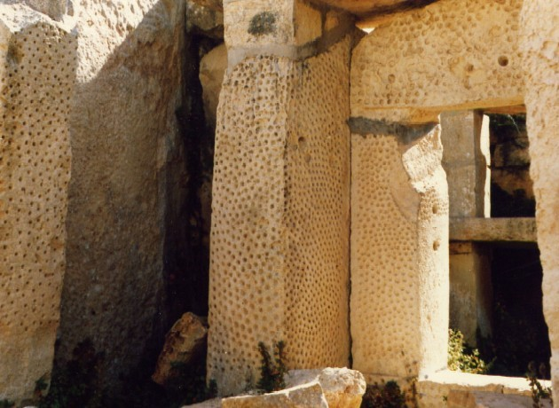 The megalithic temple Ħaġar Qim (Malta), detail Megalitický chrám Ħaġar Qim (Malta), detajlní záběr